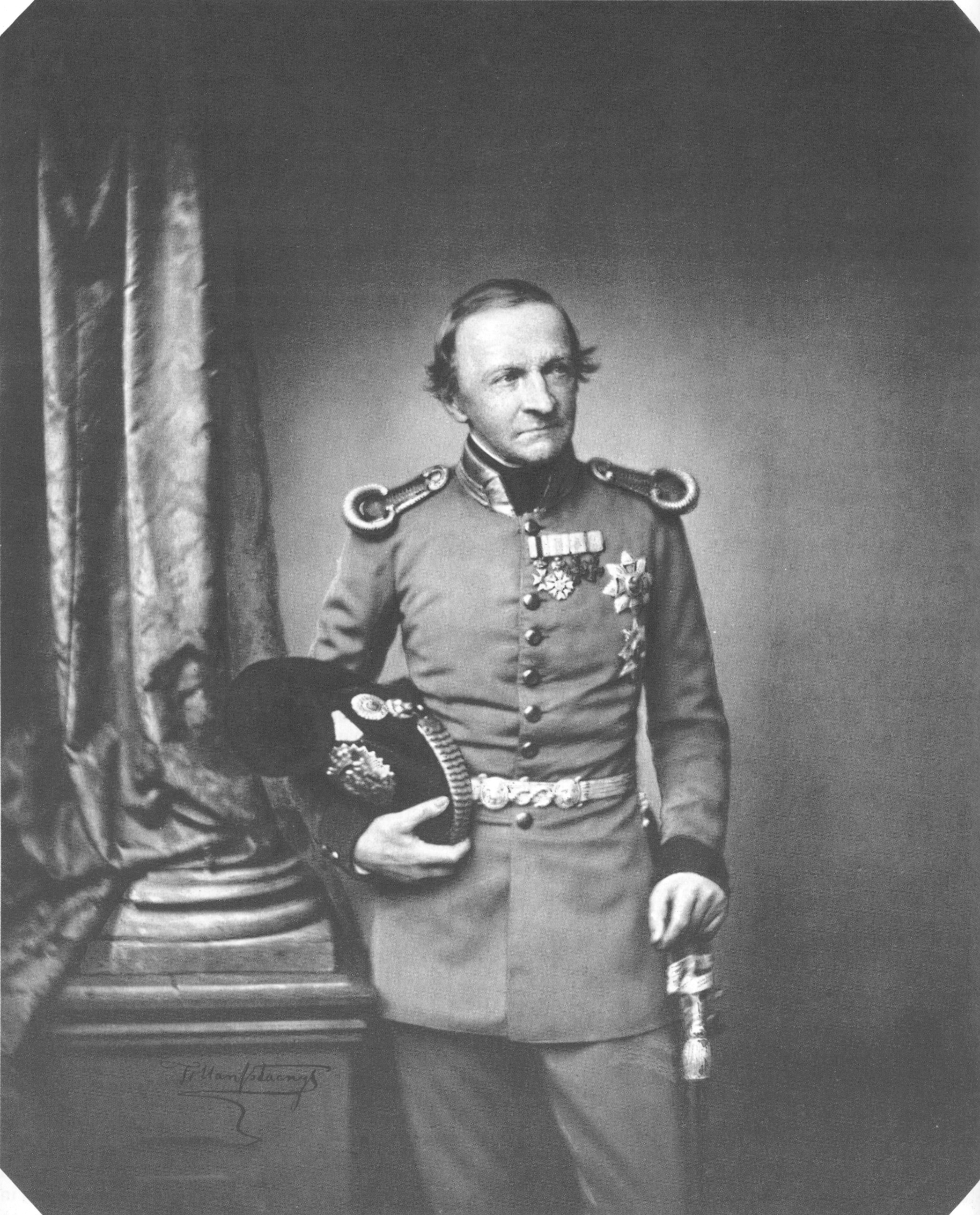 Ludwig I., König von Bayern (1786-1868)